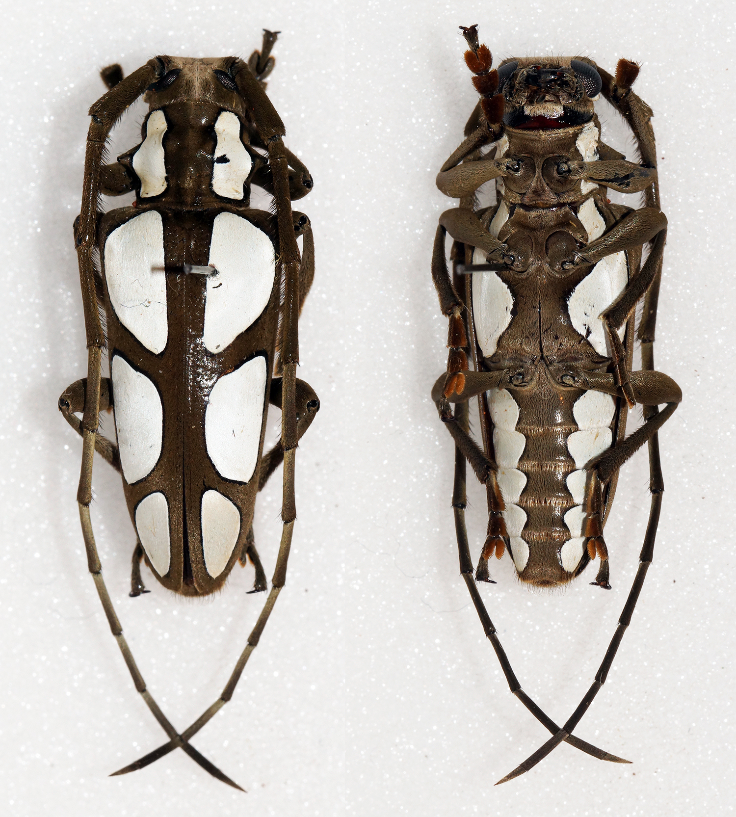 Fairmaire,1884 Sex: Male Data: 25-04-07 - 50km NE Mega - Sidamo Prov - Ethiopia Size: 30mm